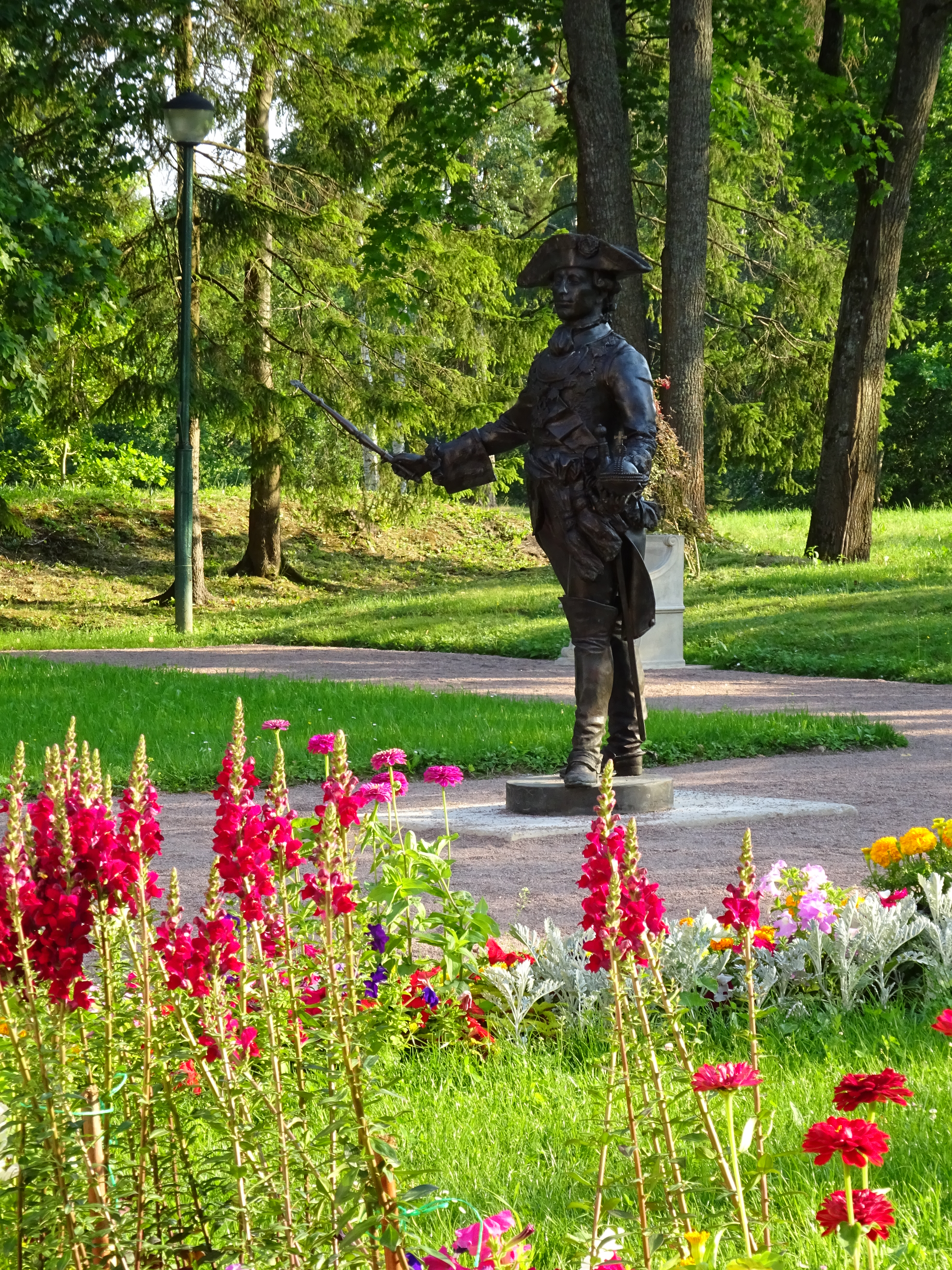 Дворцово-парковый ансамбль Верхнего парка и Нижнего сада: Дворцовый проспект, 48, Верхний парк, Ломоносов, Петродворцовый район, Санкт-Петербург